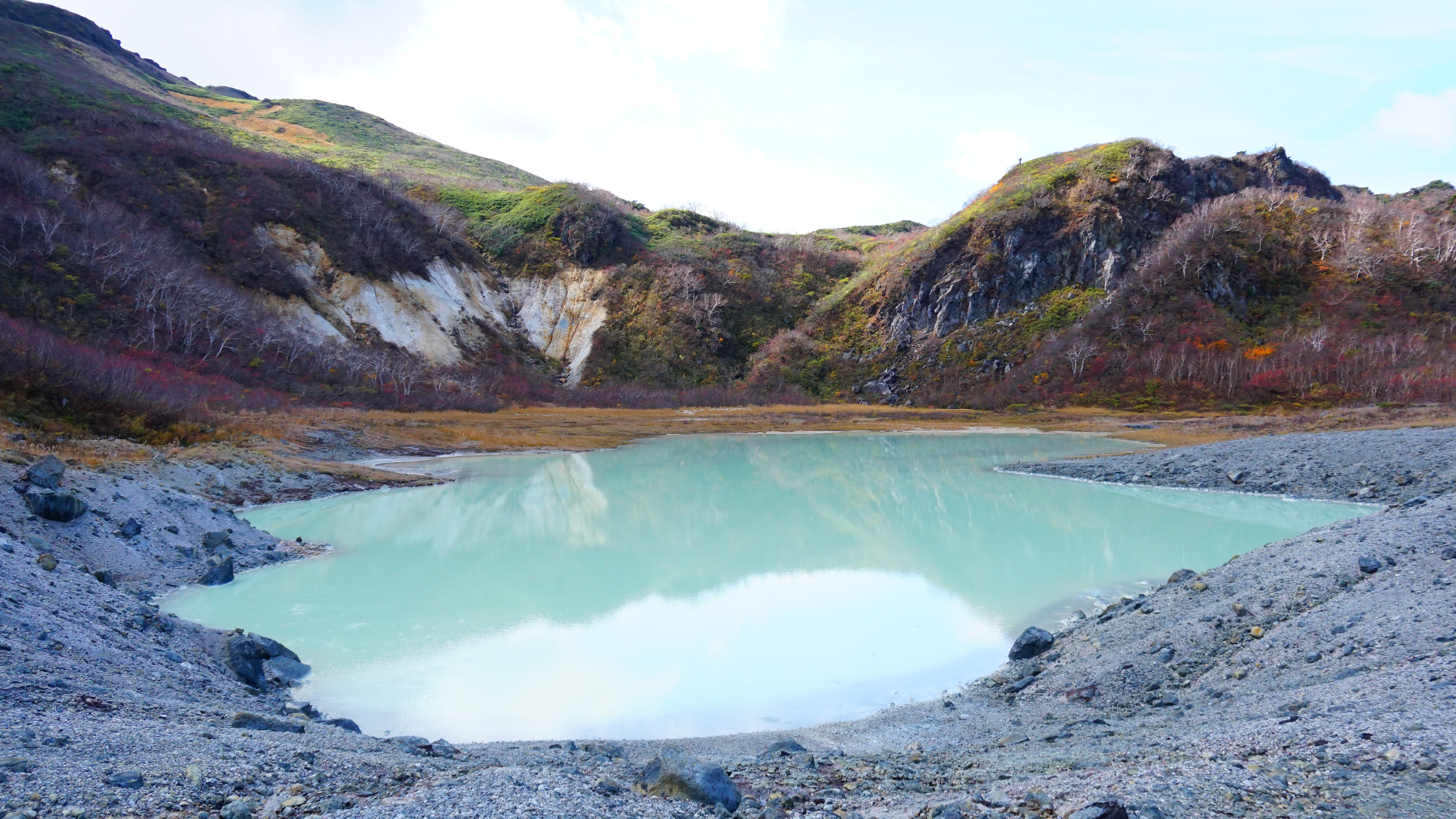 栗駒山須川コースの8合目付近にある昭和湖。昭和19年(1944年)のガス爆発によって出来た湖である。